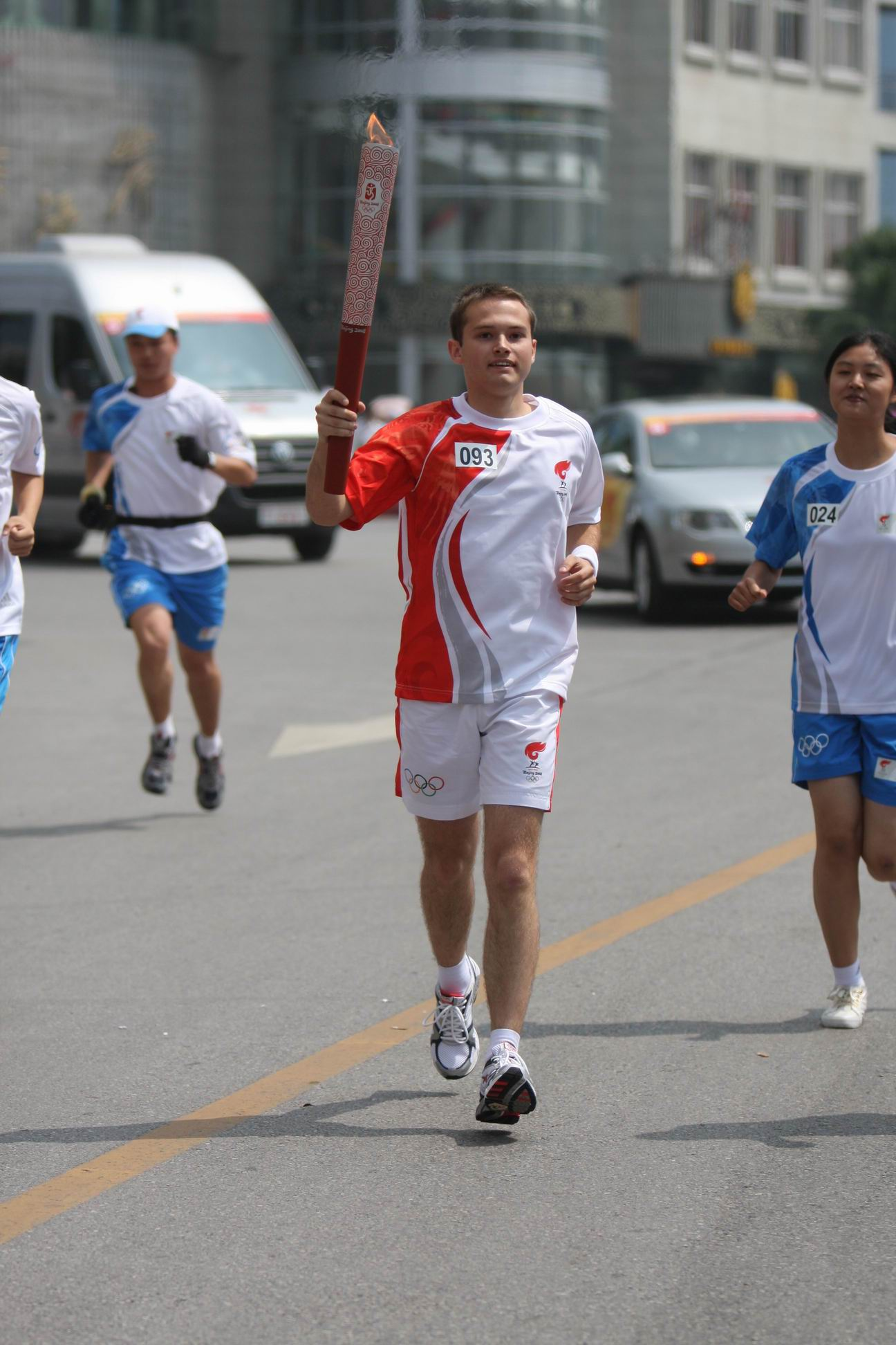 Own work, all rights released (Public domain)